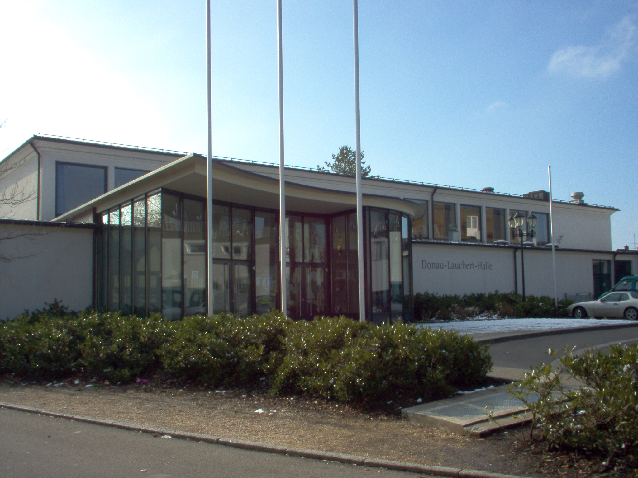 Donau-Lauchert-Halle Sigmaringendorf (Hall in Sigmaringendorf)